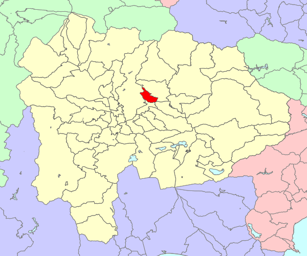 山梨県東山梨郡春日居町の位置画像。